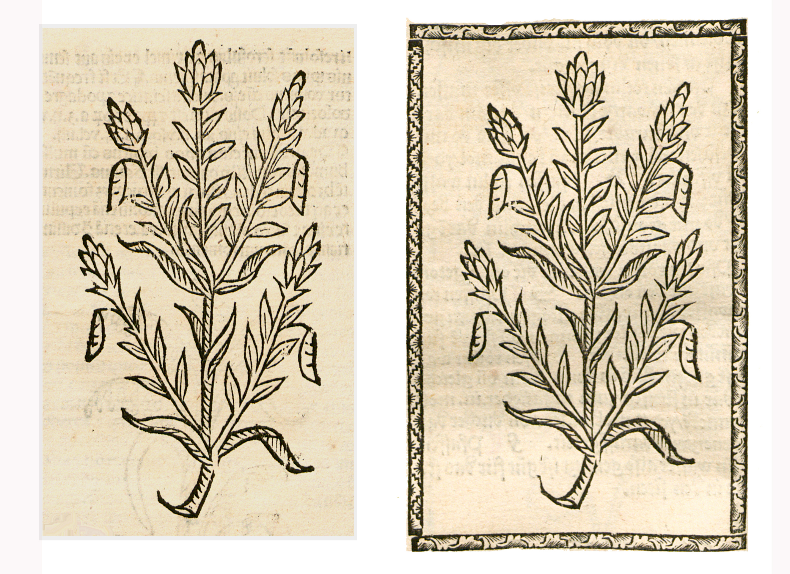 Abbildung von: Pfrymen Blüet (Cytisus scoparius)